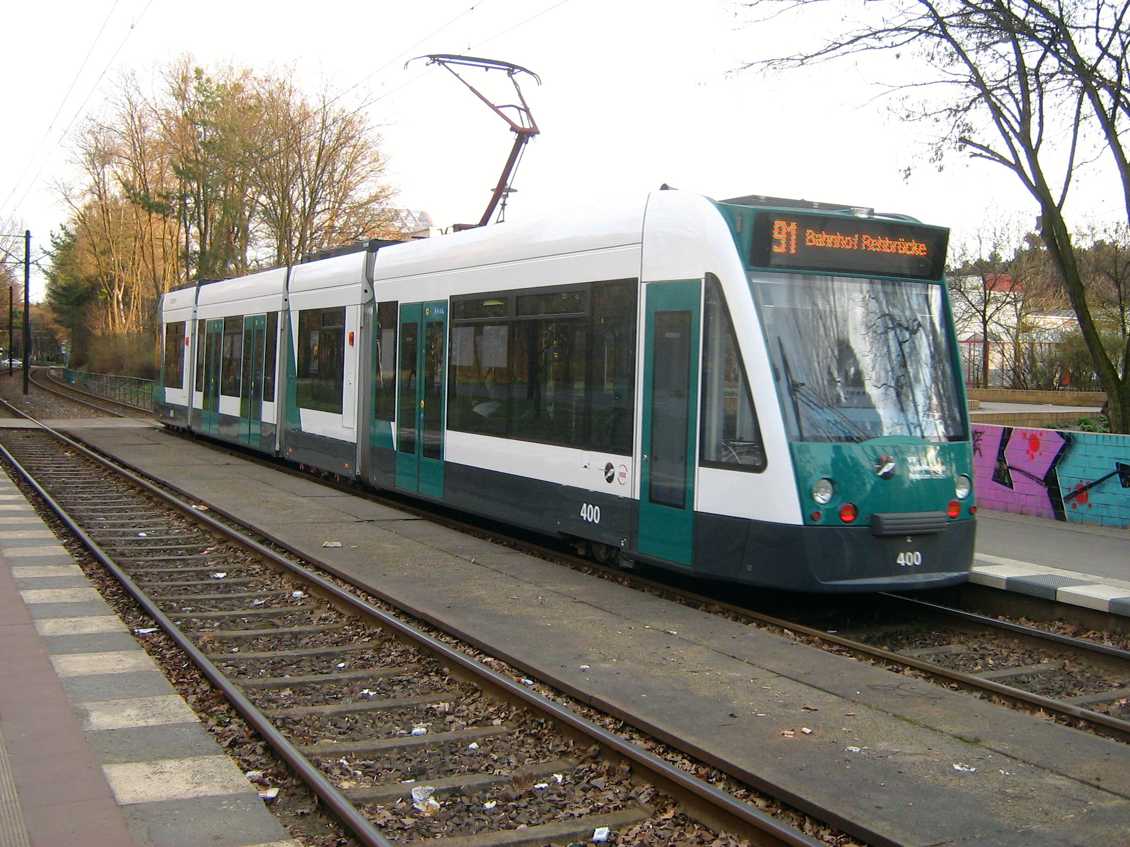 Straßenbahn Combino 400 der Linie 91 beim Stop in der Haltestelle „Friedrich-Wolf-Straße“ Potsdam-Waldstadt.